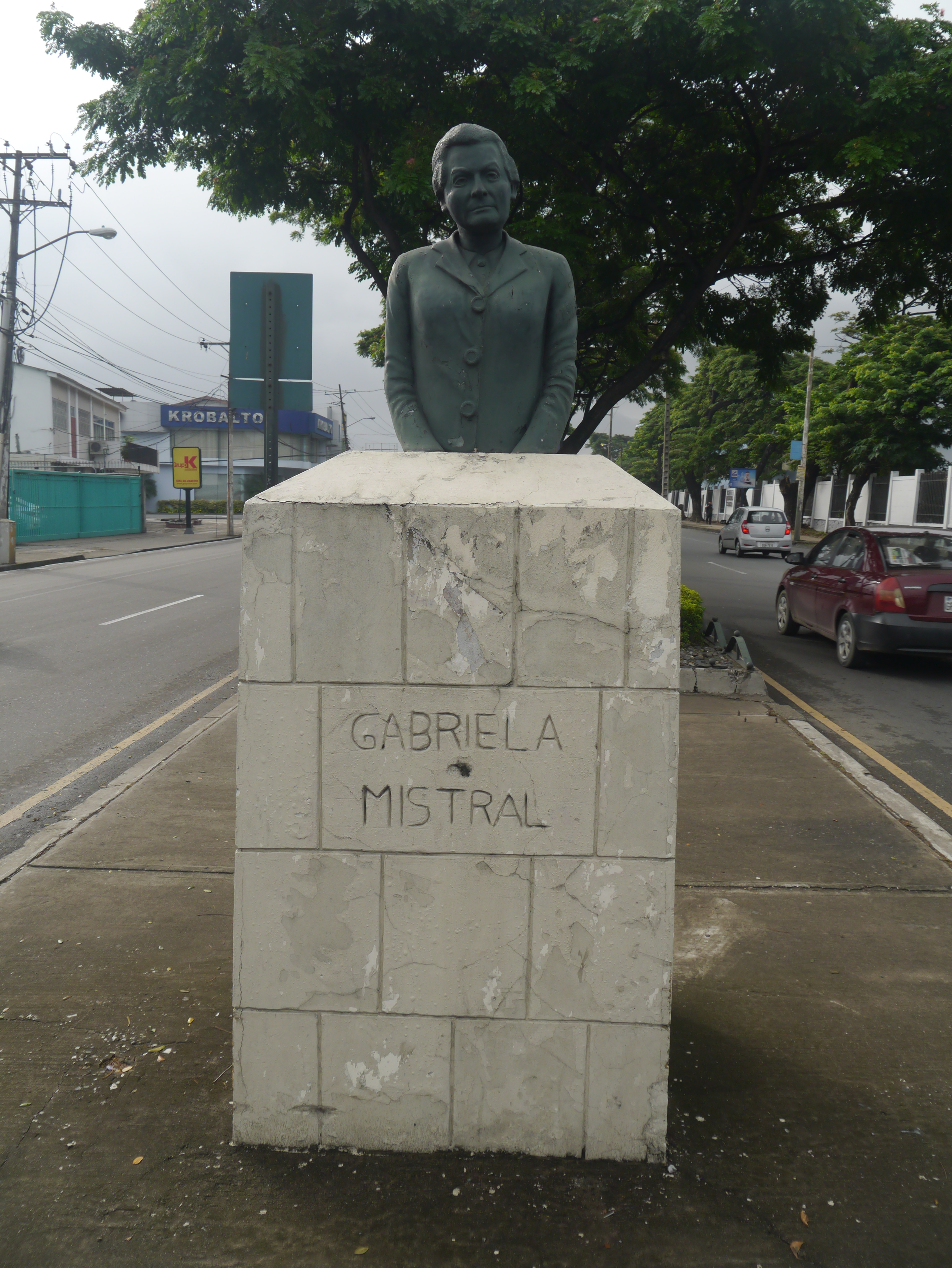 Vista frontal completa del busto de Gabriela Mistral